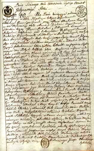 Akt darowizny nieruchomości ziemskiej dokonany przez właściciela majątku Małaszewicze Małe, wywodzącego się z tatarskiej rodziny porucznika Abrahama Koryckiego z 7 IX 1811 roku - strona 1